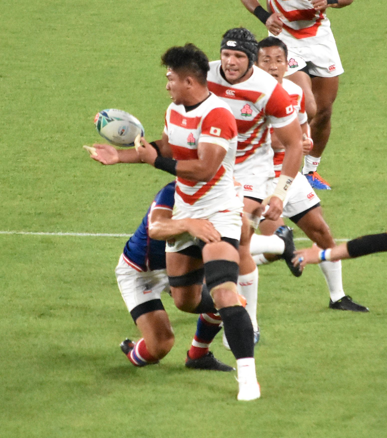 姫野 和樹